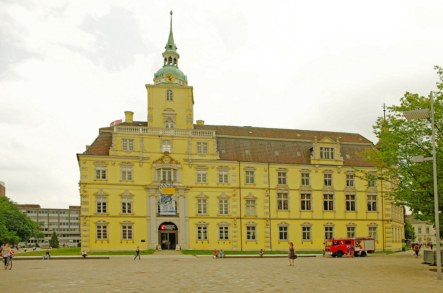 Niedersächsische Landesmuseum für Kunst und Kulturgeschichte am Schlossplatz in Oldenburg